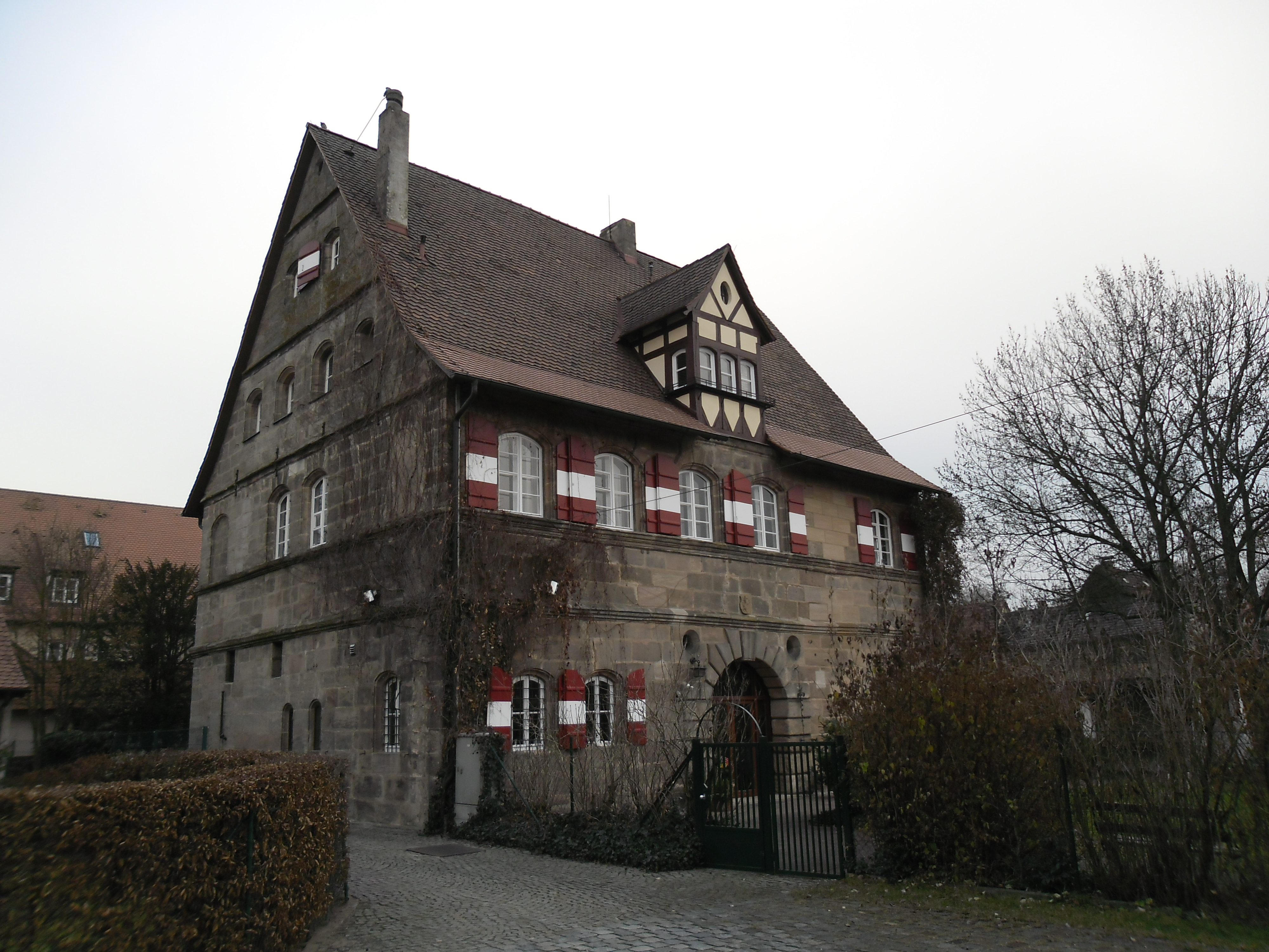 Das Scheurl'sche Schloss beziehungsweise Zeidelschloss in der Fischbacher Hauptstraße 164/166